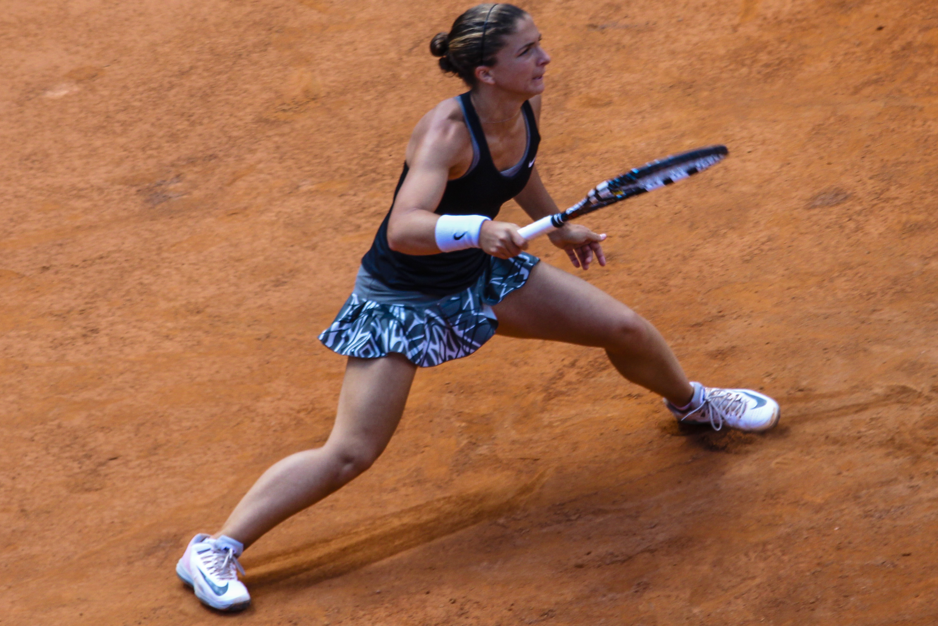 Sara Errani durante gli Internazionali d'Italia 2014